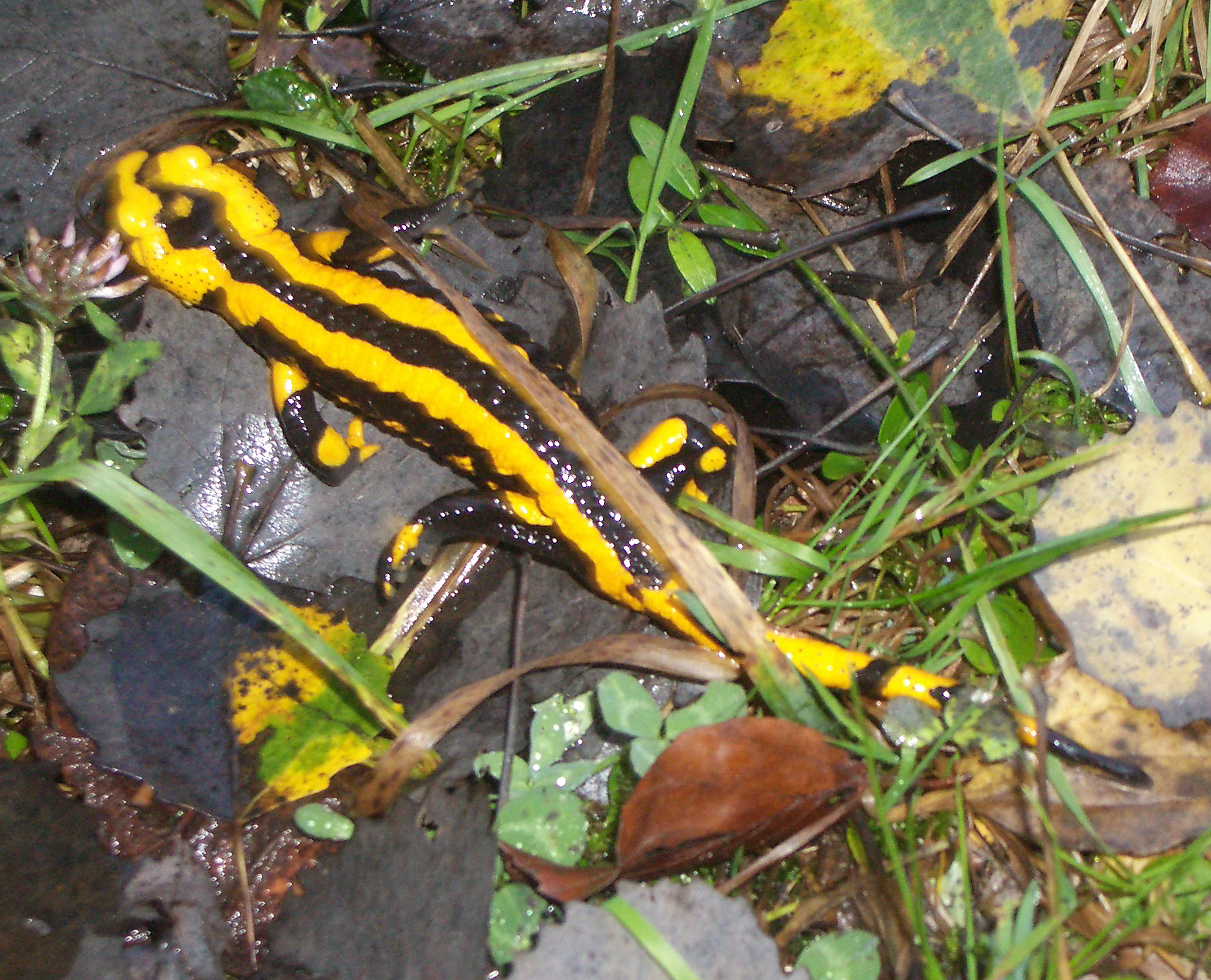 Salamandra salamandra in Oberrot, Baden-Württemberg, Germany, Nov 2005